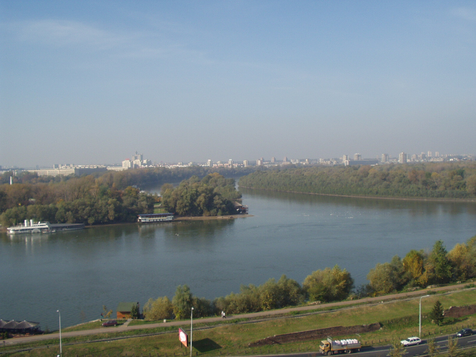 Soutok Sávy s Dunajem v Bělehradě, pohled z Kalemegdanu